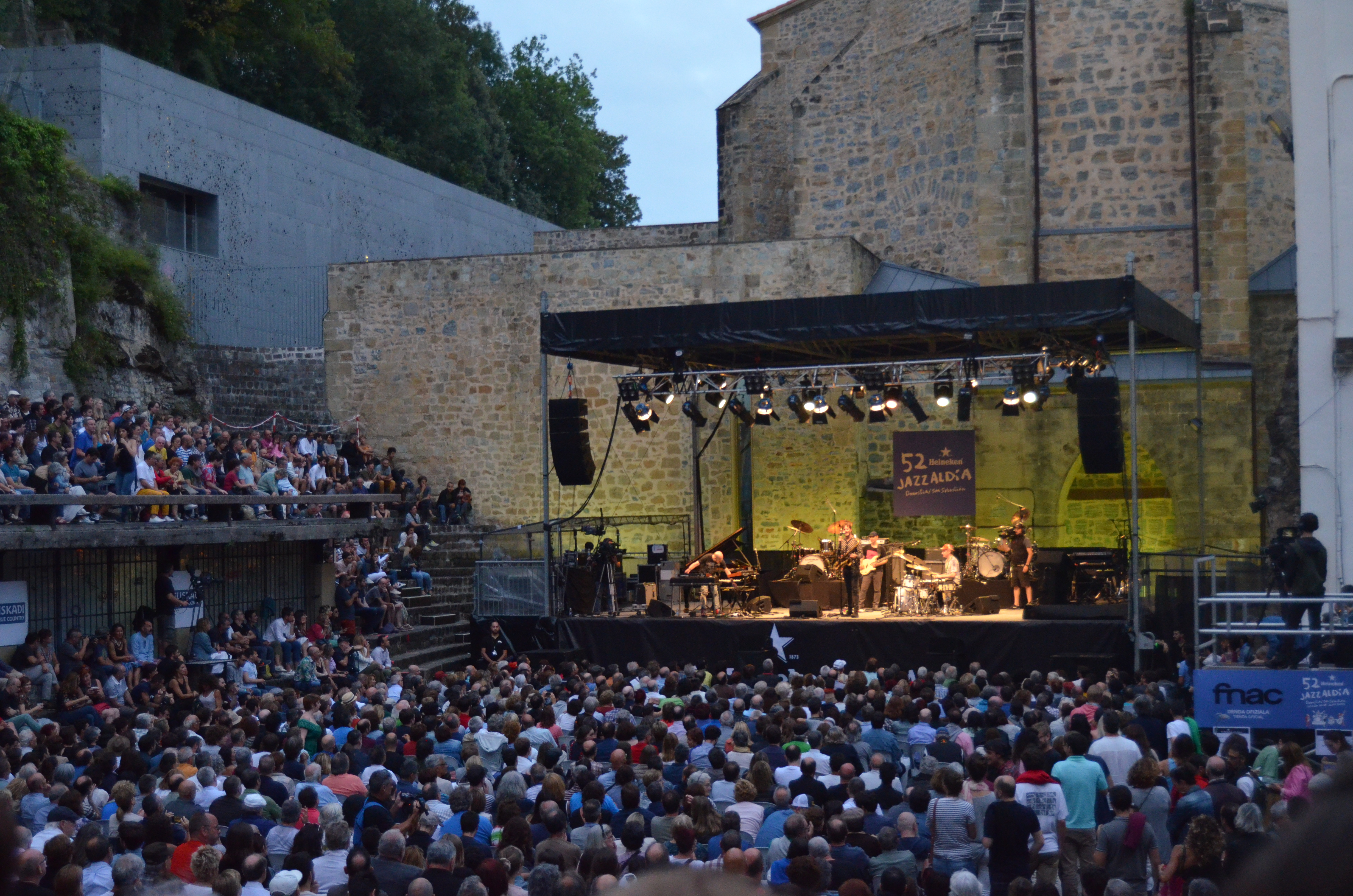 Concierto de Donny McCaslin Quartet en Donostia Jazzaldia (Escenario Plaza Trinidad, 23 de julio de 2017) Festival de Jazz de San Sebastián